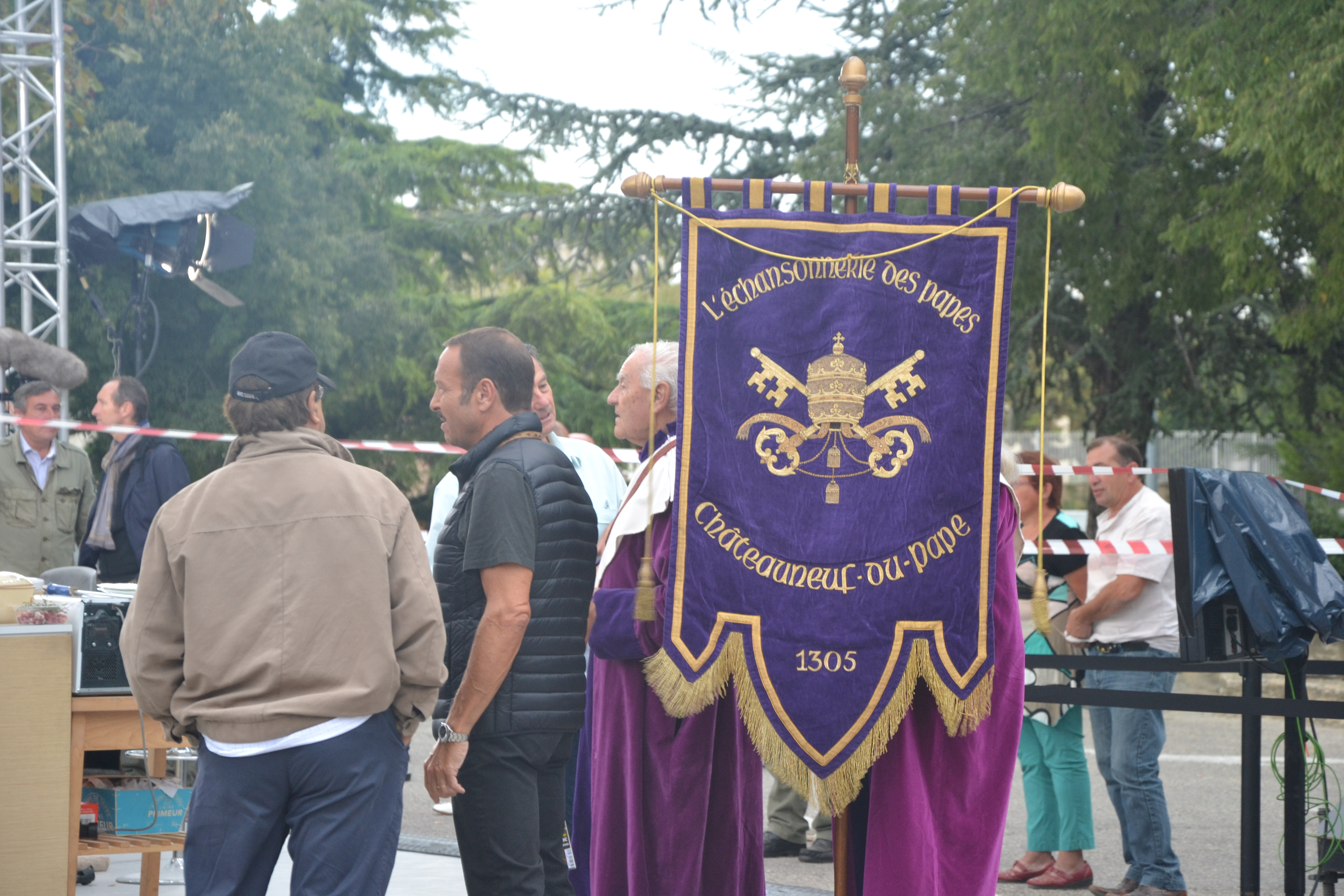 lors de l'enregistrement de l'émission de France 3 Midi en France, à Châteauneuf du Pape (Vaucluse)